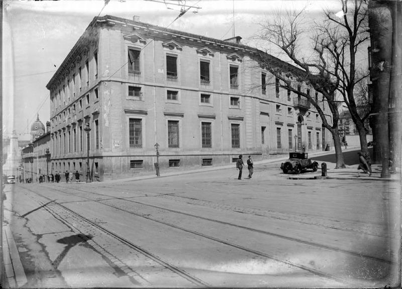 Primera Secretaría de Estado